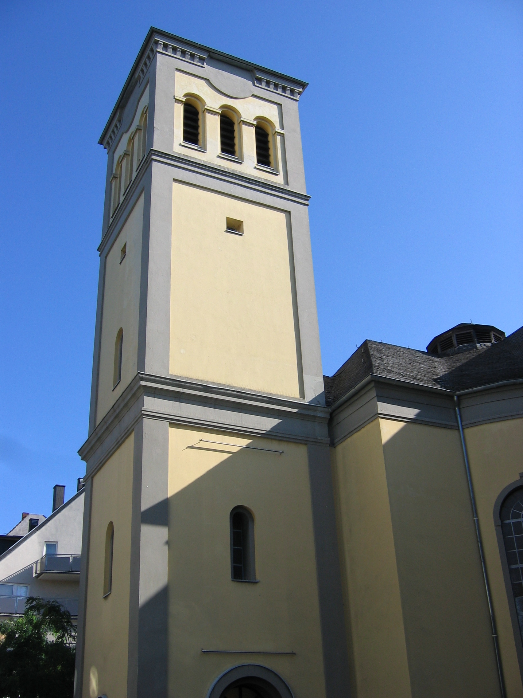 Ev. Friedenskirche in Köln-Mülheim